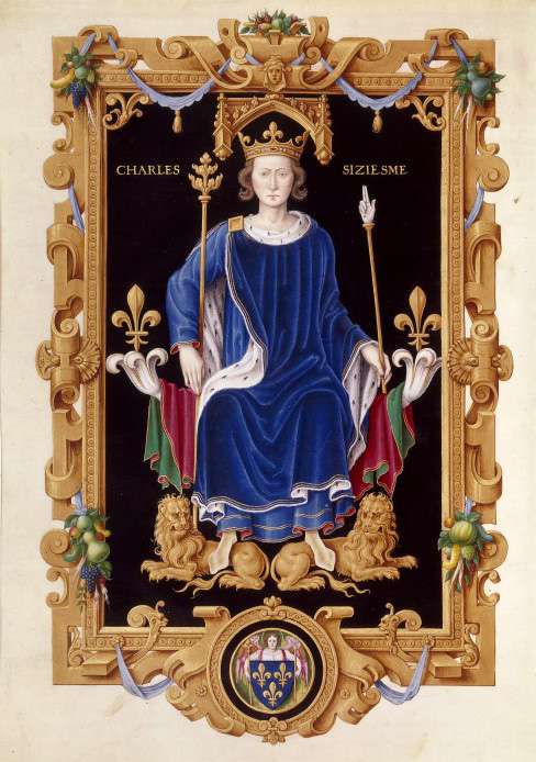 Charles VI de France d'après le Recueil des rois de France de Jean Du Tillet. Bibliothèque Nationale de France. Peinture réalisée d'après l'image gravée sur le grand sceau du roi. Un médaillon, au milieu de la partie inférieure de la bordure, présente l'image du contre-sceau royal.